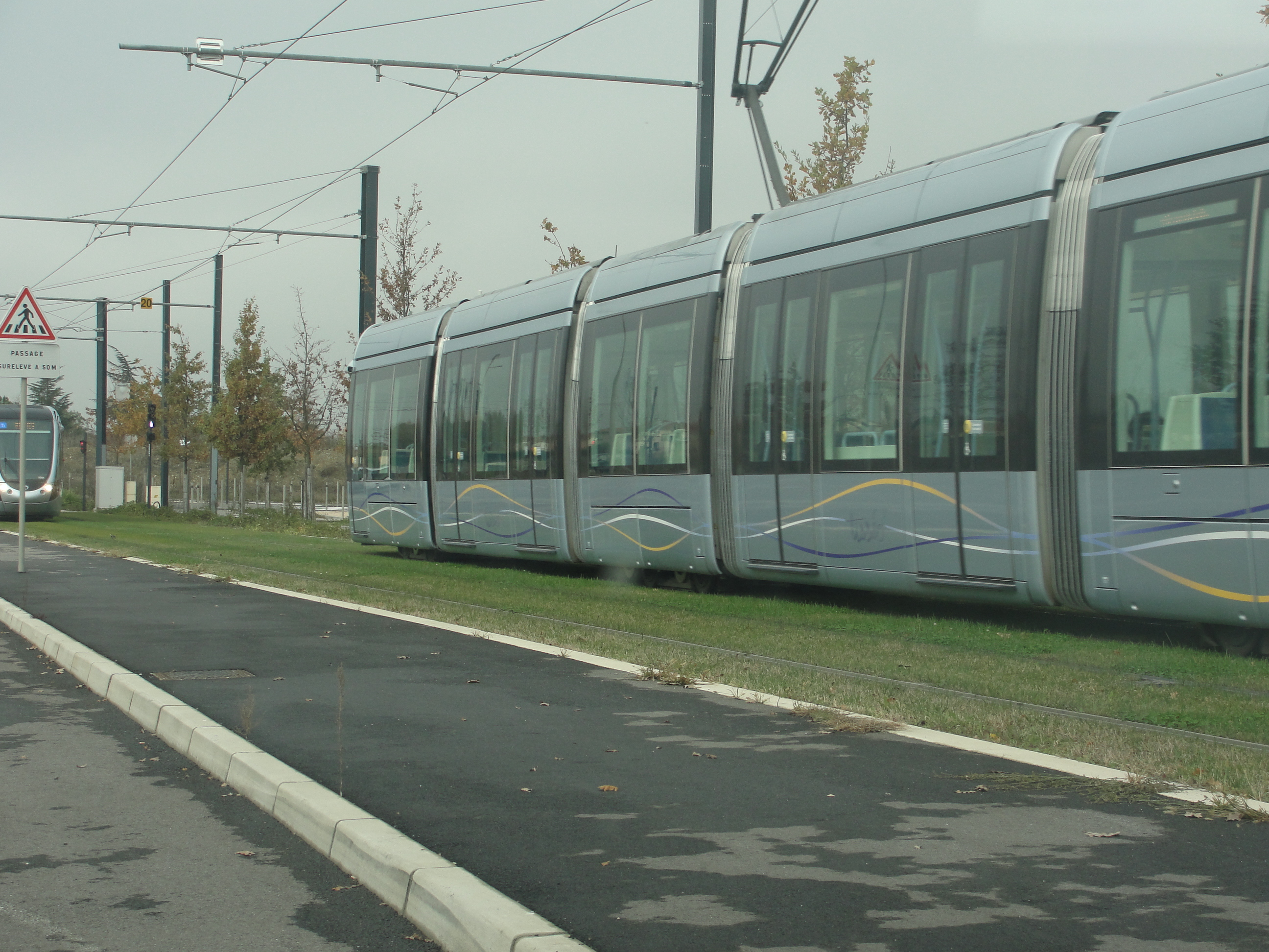 tram T1 toulouse tisséo